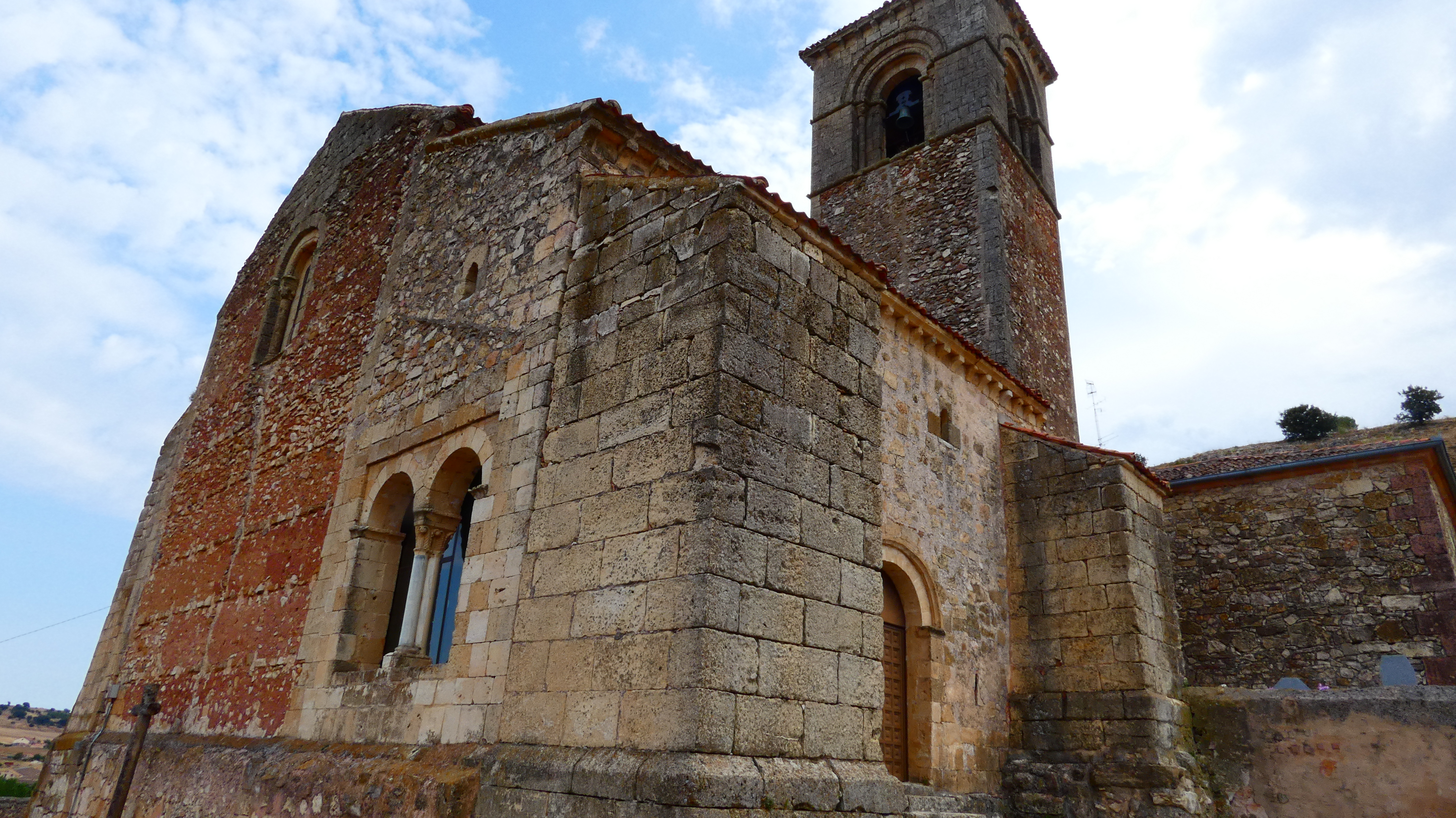 galería porticada de caballar